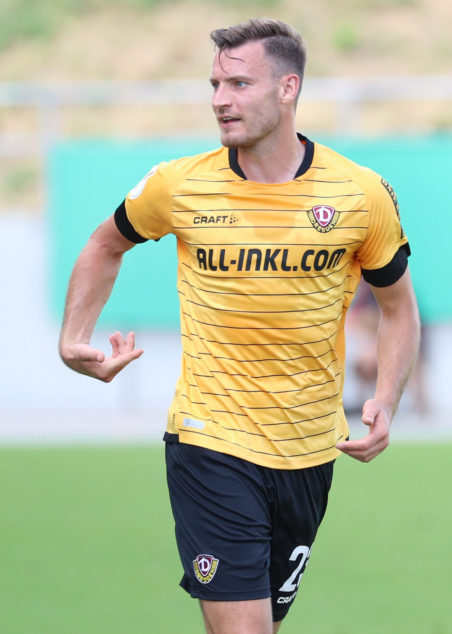 DFB-Pokal 2019/20, 1. Hauptrunde, TuS Dassendorf gegen SG Dynamo Dresden 0:3 (0:1)